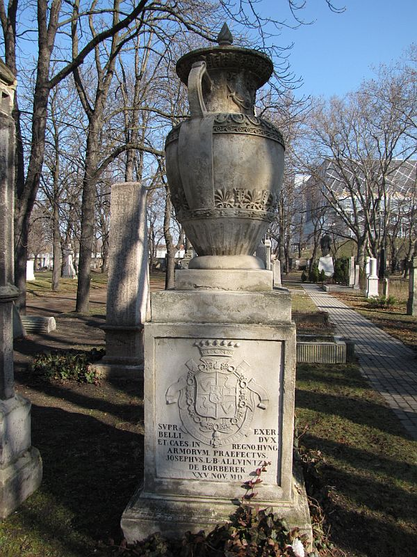 Alvinczi József, báró (Alvinc, 1735. február 1. – Buda, 1810. november 25.) császári tábornagy sírja Budapesten. Kerepesi temető: 17/1-1-40